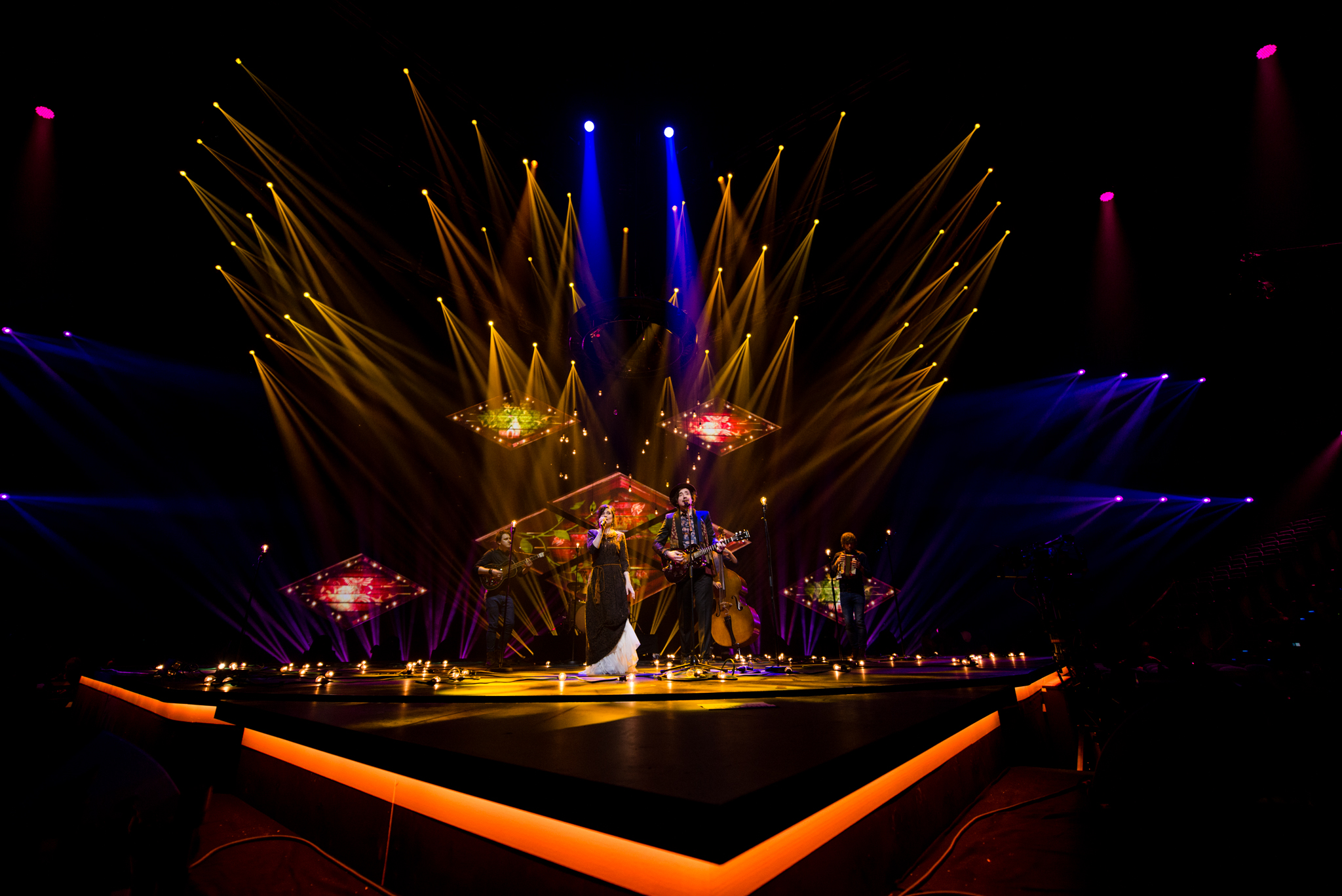 'Eurovision Song Contest 2015 - Unser Song für Österreich': 'Mrs. Greenbird'